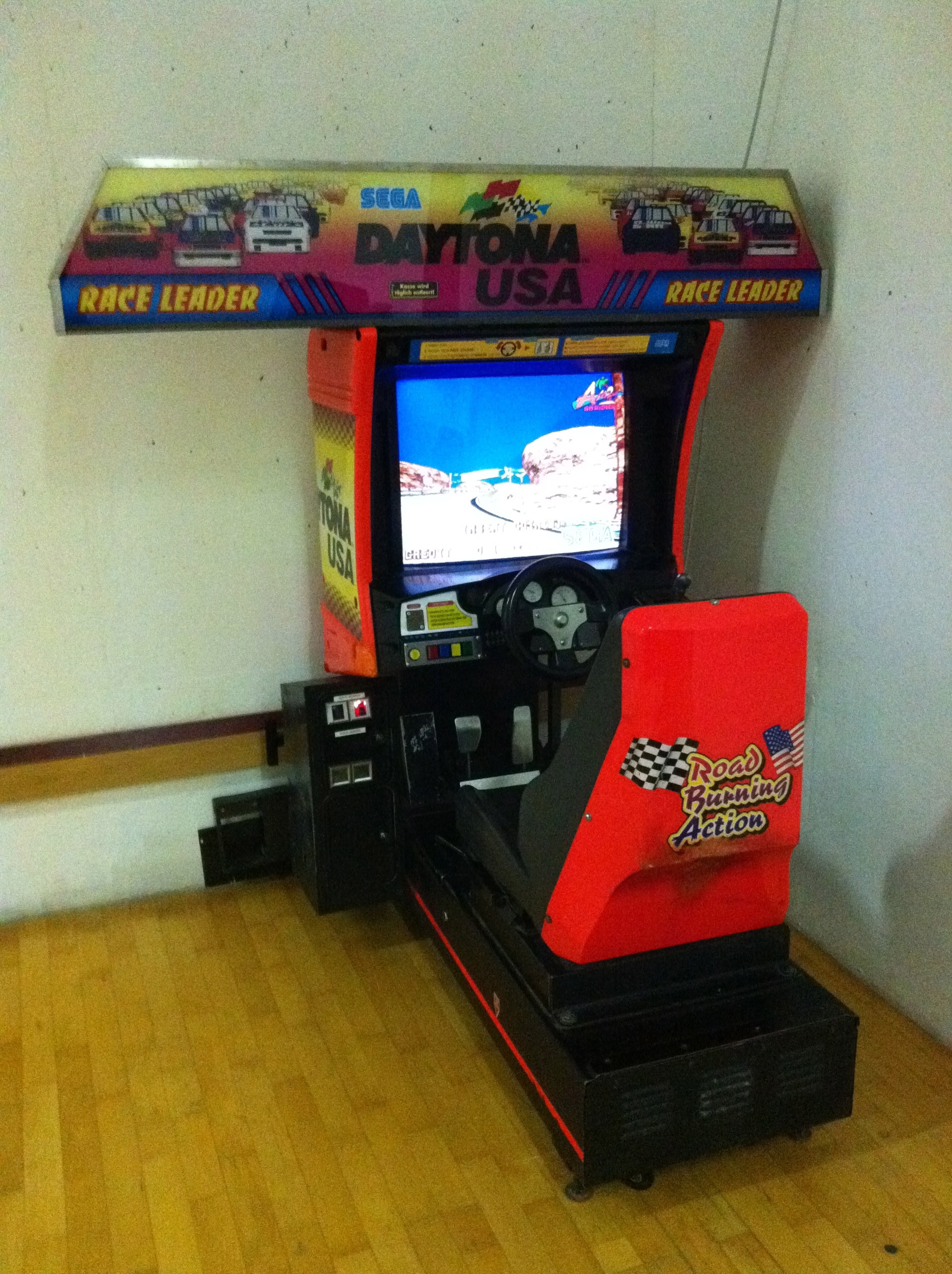 Arcade Automat Sega Daytona USA